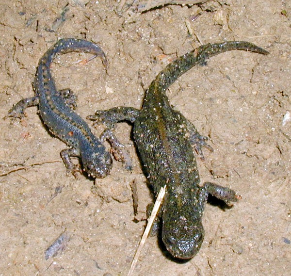 Triturus alpestris